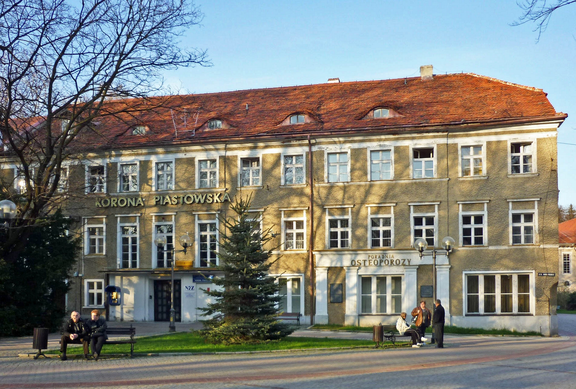 Szczawno-Zdrój, ul. Wojska Polskiego 1 - sanatorium uzdrowiskowe "Korona Piastowska", miejsce urodzenia niemieckiego noblisty Gerhardta Hauptmana